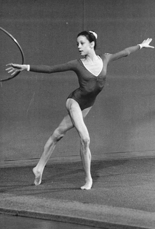 Bianca Dittrich ADN-ZB Weisflog 19.8.82 Eisenhüttenstadt: DDR-Meisterschaften in der Rhytmischen Sportgymnastik -Nach dem ersten Wettkampftag lag die Titelverteidigerin Bianca Dittrich (SC Chemie Halle-im Foto beim Intervisionspokal 1981 in Cottbus) gemeinsam mit der Vorjahresdritten Katrin Huschke (SC Leipzig) mit jeweils 19,10 Punkten in Führung.